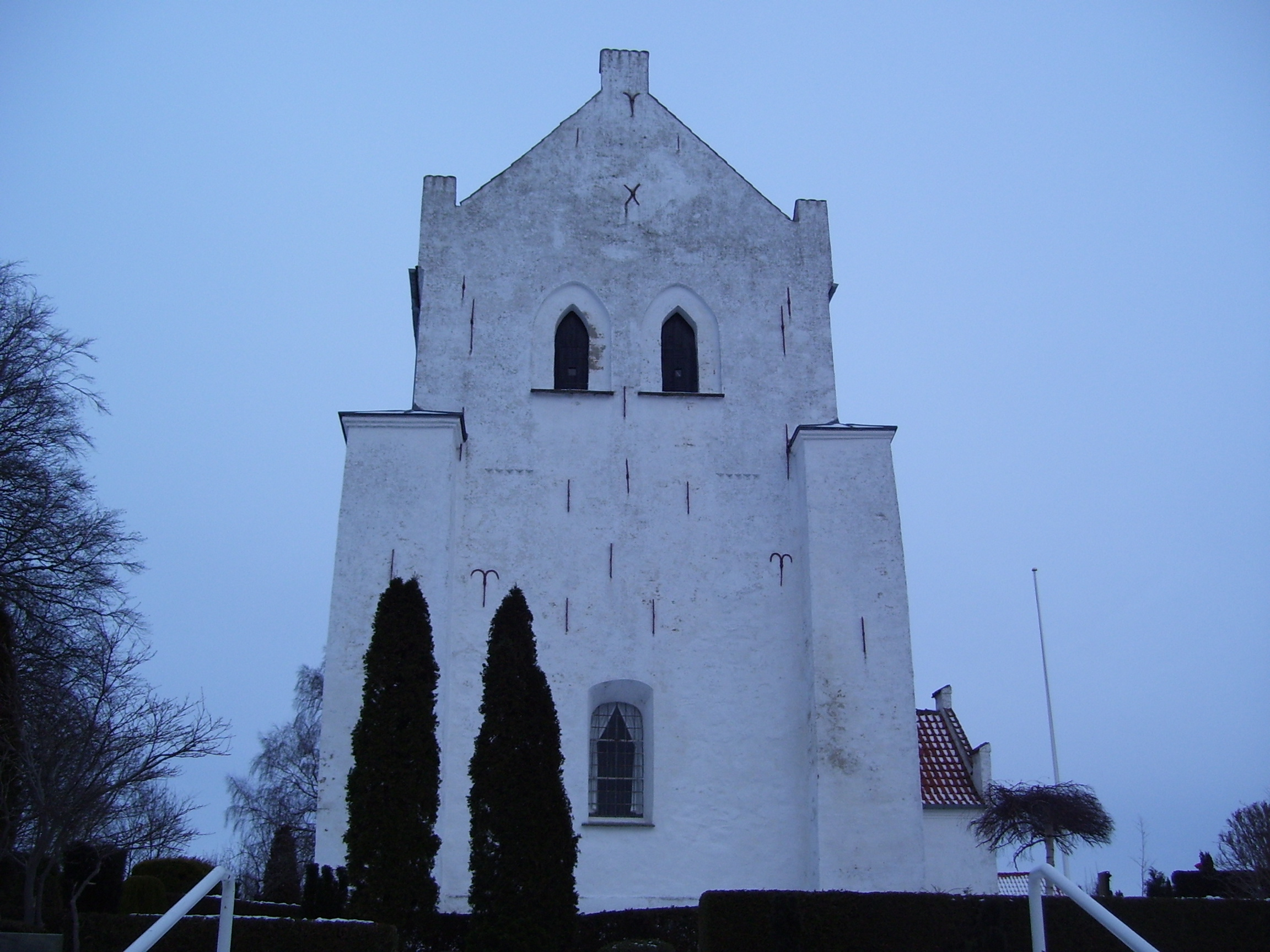 Ramløse kirke fra vest.